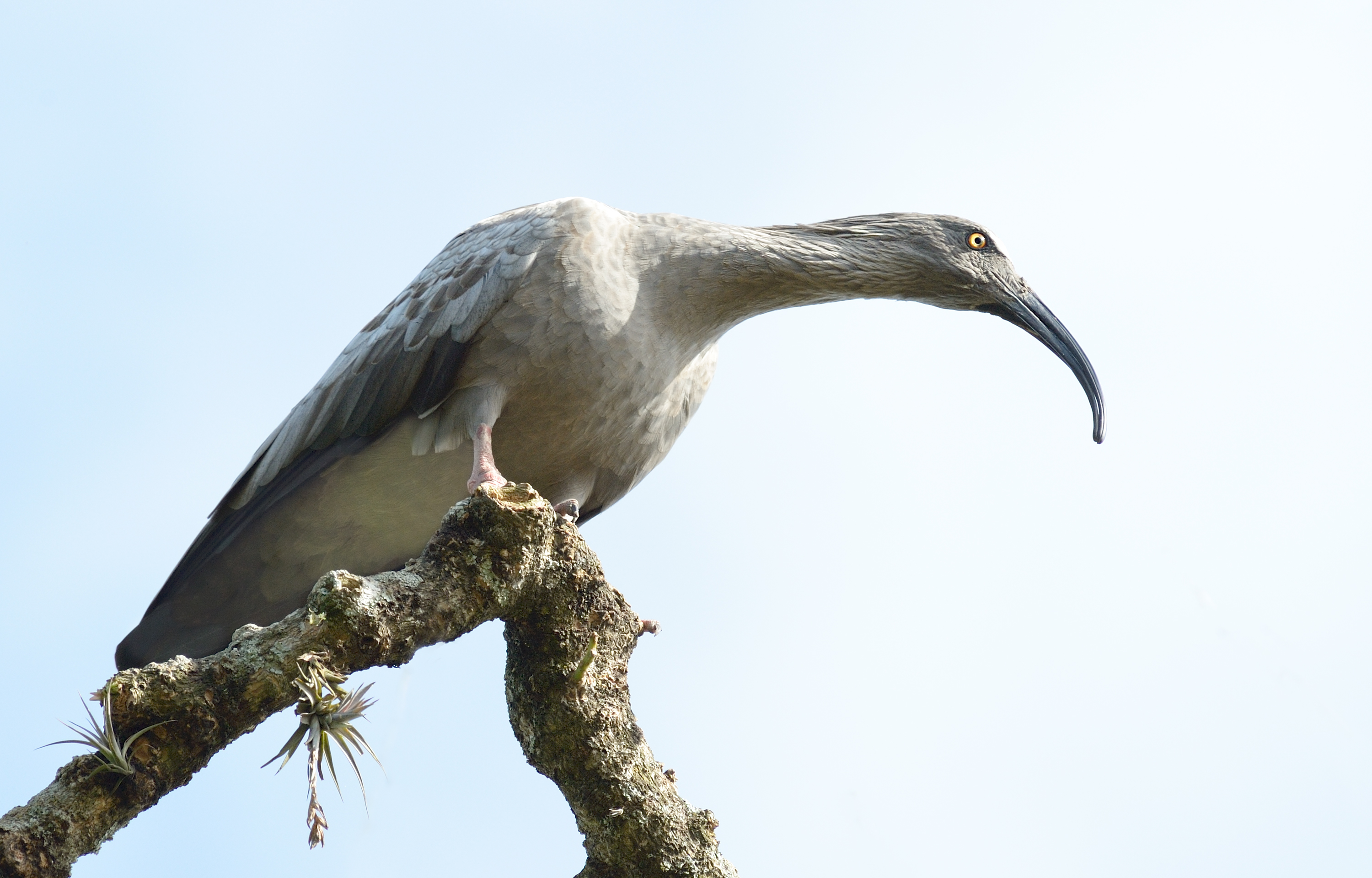 Bandurria tomada en un campo del Departamento de Rocha, Uruguay